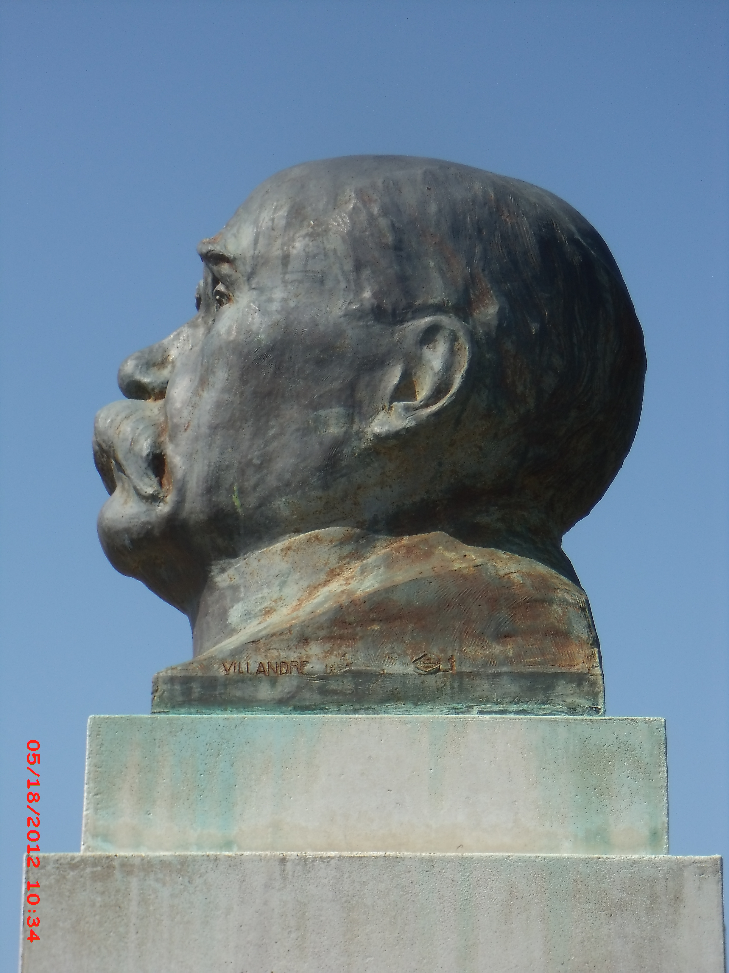 Maison de Georges Clémenceau, Saint-Vincent-sur-Jard (Vendée). Le buste sur l'esplanade d'entrée.